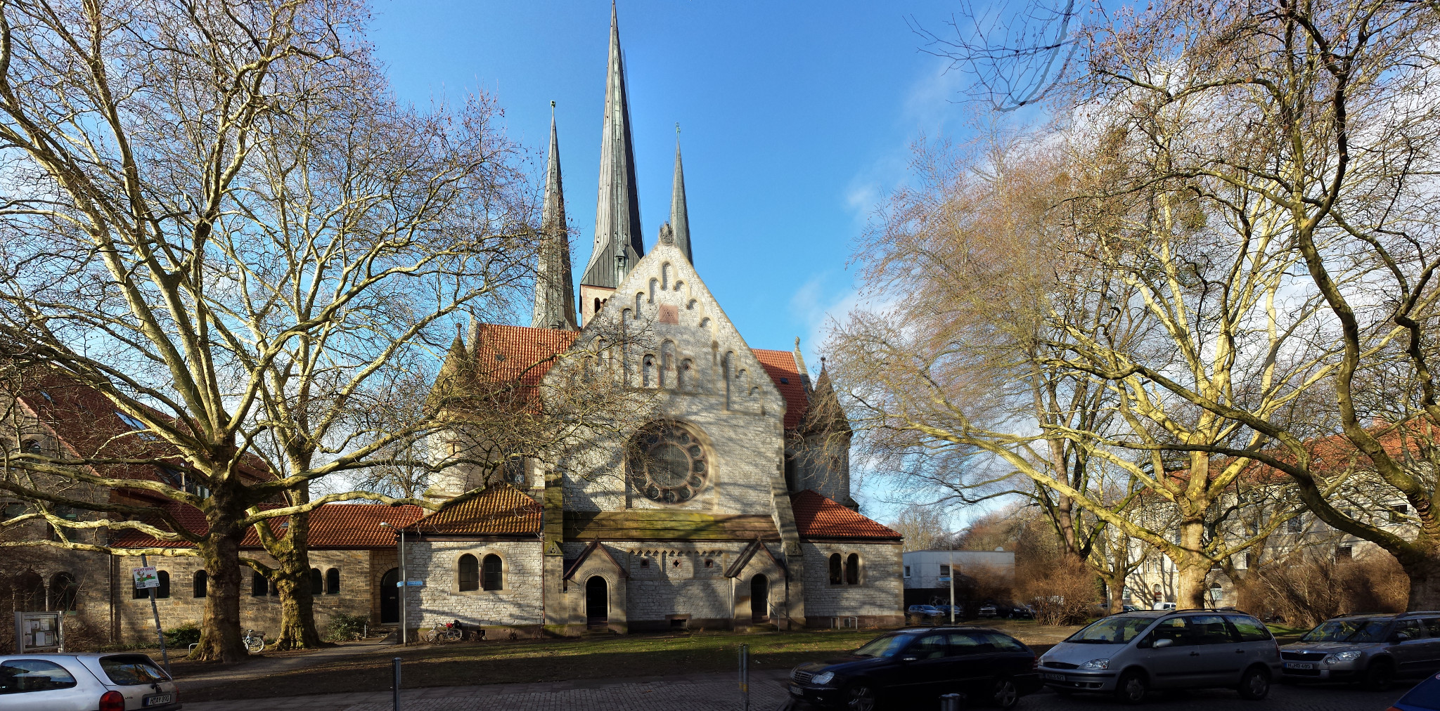 Bethlehemkirche Hannover-Linden nach der Renovierung der Aussenfassade